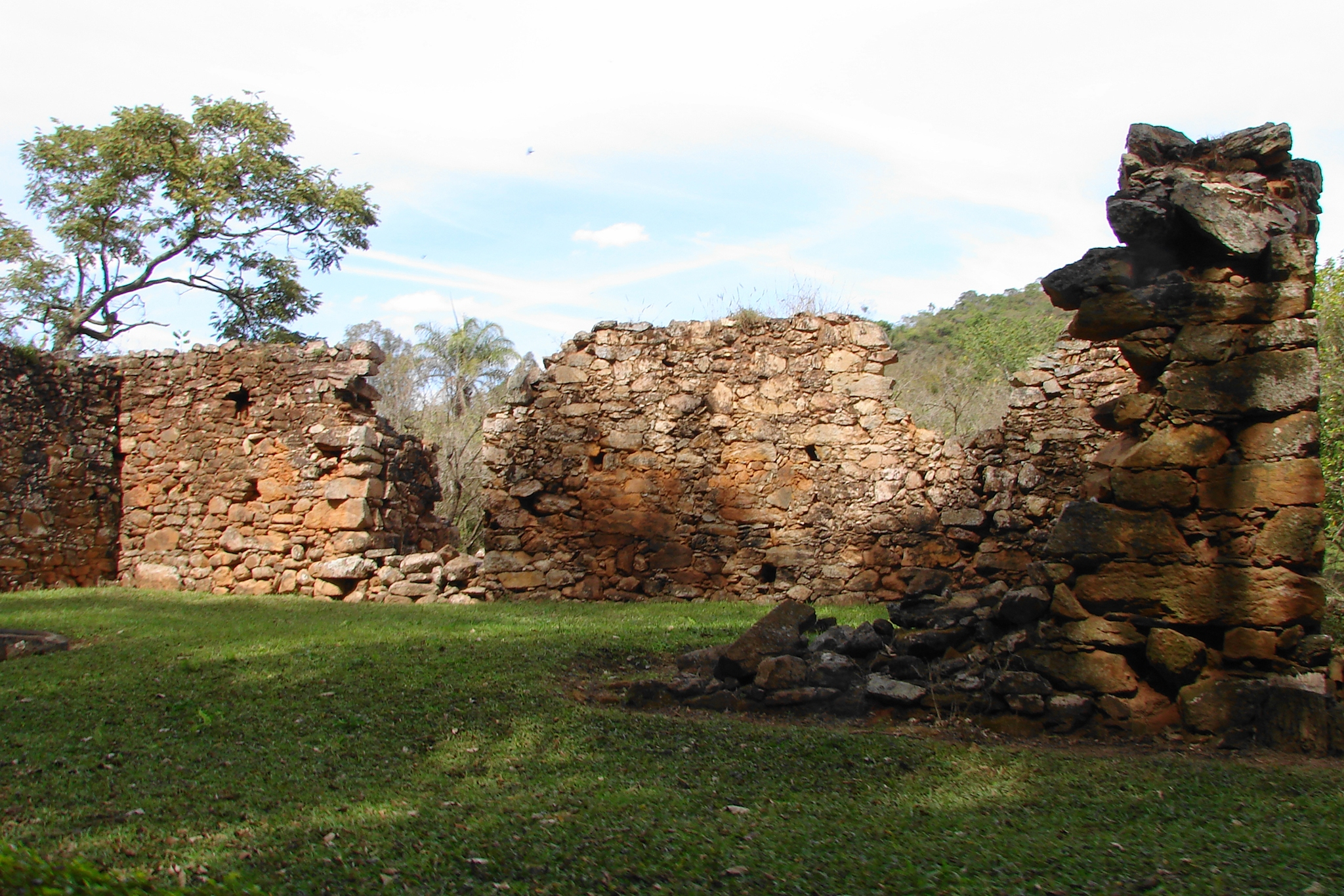 A Fazenda do Pombal foi o local de nascimento de José Joaquim da Silva Xavier, o Tiradentes.